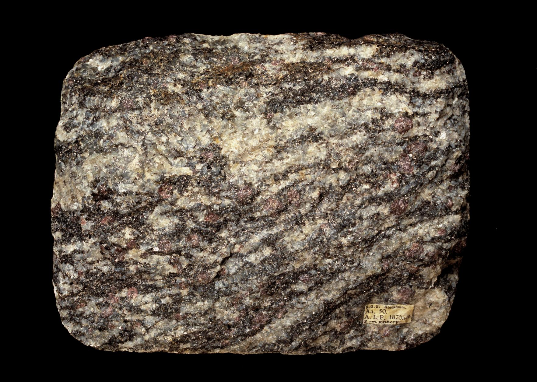 Södermanlands landskapssten är granatådergnejs. På få ställen i landet är granatådergnejsen så praktfull som i Södermanland. För två miljarder år sedan avsattes lösa sediment av bland annat lera, sand och organiskt material. Sedimenten omvandlades till en skiffer som genom veckning och andra rörelser sänktes ner till stora djup i jordskorpan och värmdes upp för mellan 1850 och 1900 miljoner år sedan. Av skiffern bildades den gråa, kristallina, sliriga, kvarts-fältspat-glimmergnejsen med vita nålar av sillimanit, blå korn av cordierit och de upp till fem centimeter stora rödvioletta granater (almandin) vi ser idag. Kolet från det organiska materialet bildar nu grafit och järnsulfiden förekommer som magnetkis.